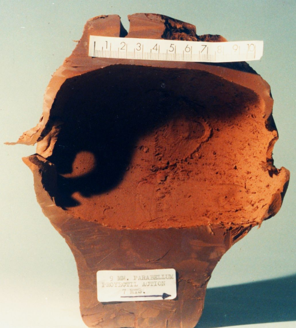 Prova de balística exterior. Reconstrucció de la cavitat temporal ocasionada per un projectil de cal. 9 mm. Parabellum.